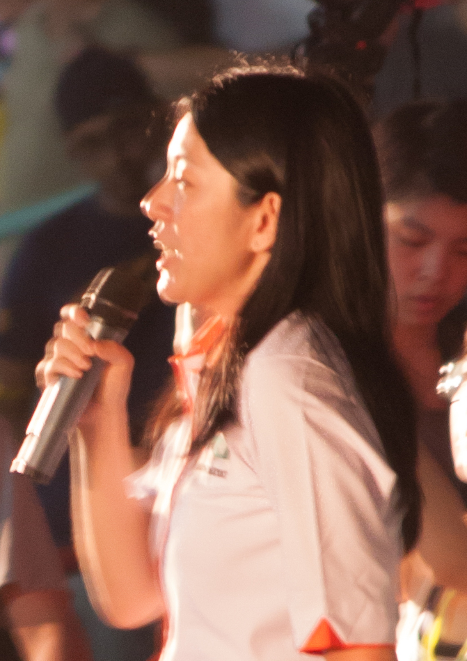 Yeo Bee Yin.